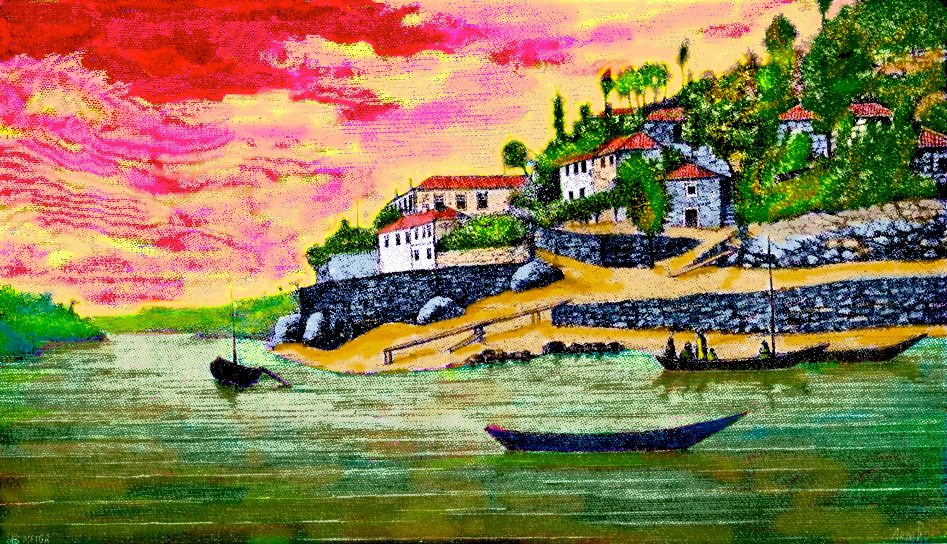 gravure représentant le bourg de Foz do Sousa, à Gondomar, Portugal. In Minho Pittoresco, de José Augusto Vieira. Livraria de Antonio Maria Pereira. Lisboa.1886